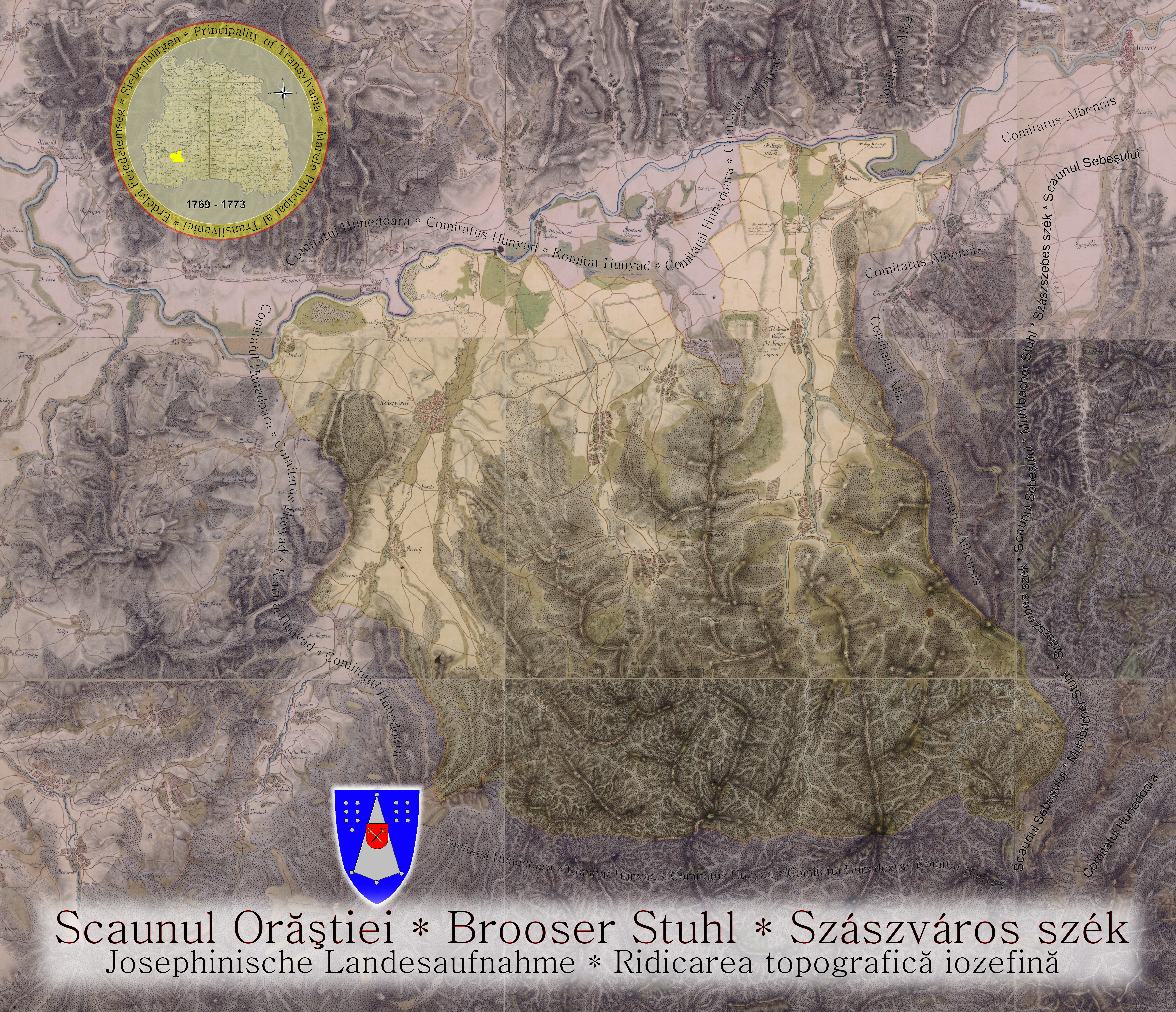 Scaunul Orăştiei în Harta Iosefină a Transilvaniei, 1769 - 1773. Harta a fost creată prin concatenarea planşelor iozefine nr. 184-186, 200-202 şi 216-218.